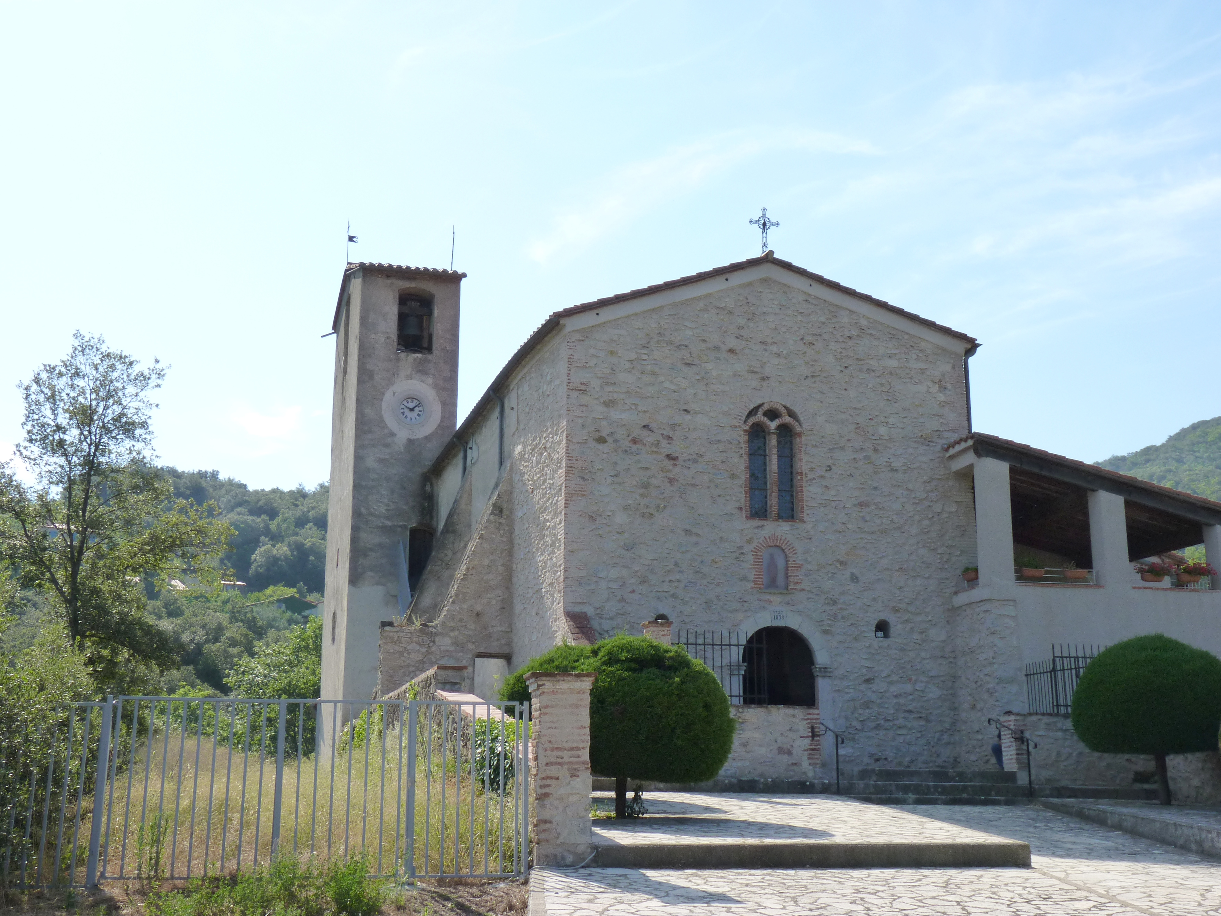 Église de Reynès (Pyrénées-Orientales, Languedoc-Roussillon, France)